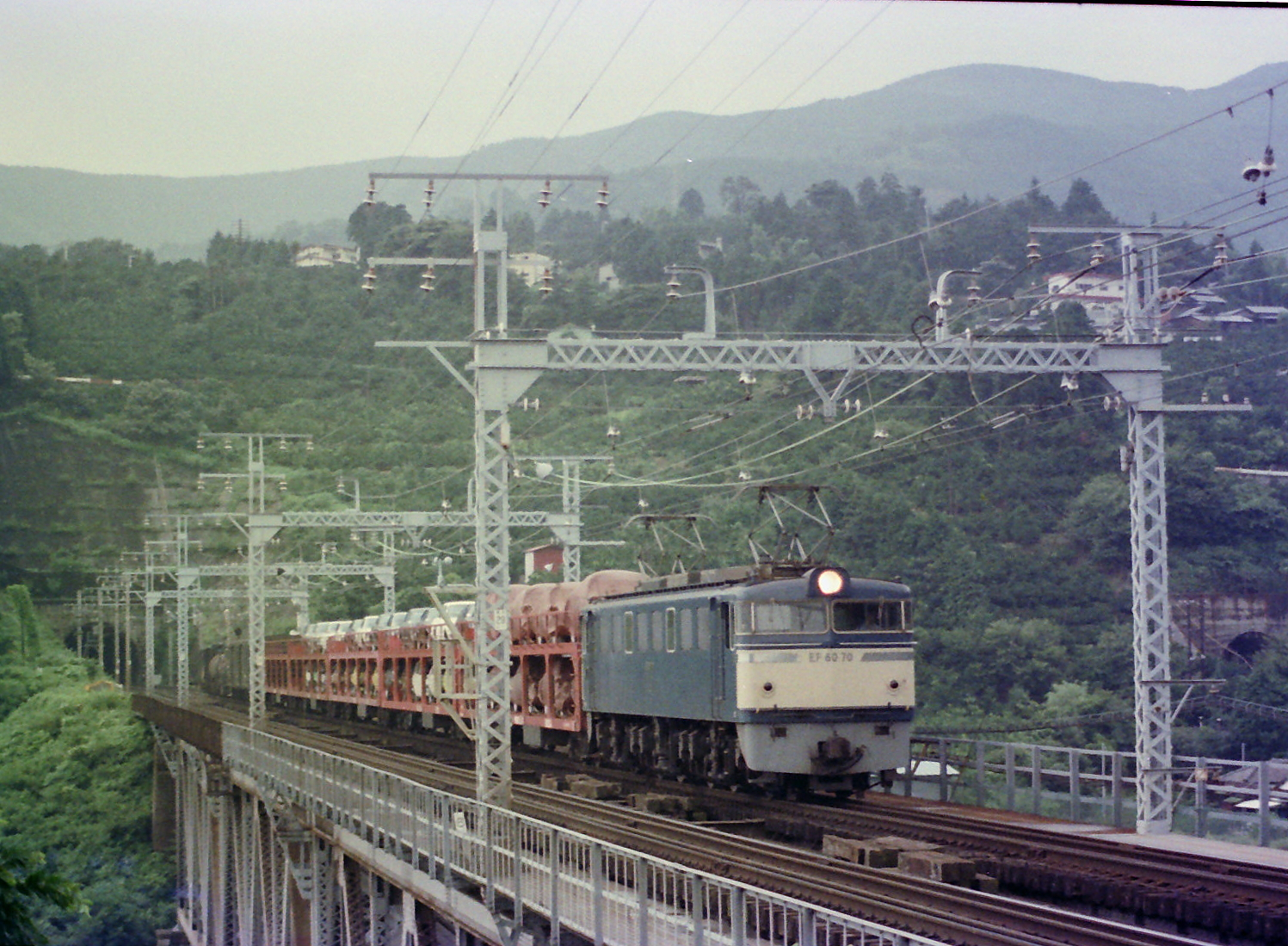 東海道本線 白糸川橋梁（根府川鉄橋）